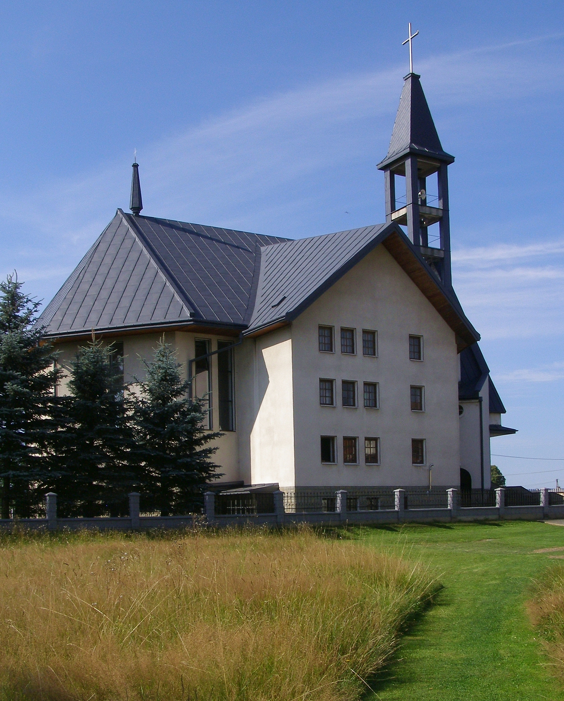 wieś Wójtowa